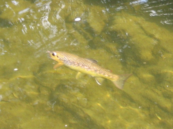 Pstruh obecný - potoční (Salmo trutta) ulovený na umělou mušku